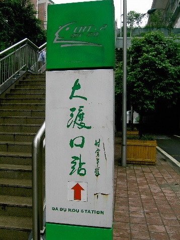 轻轨大渡口站